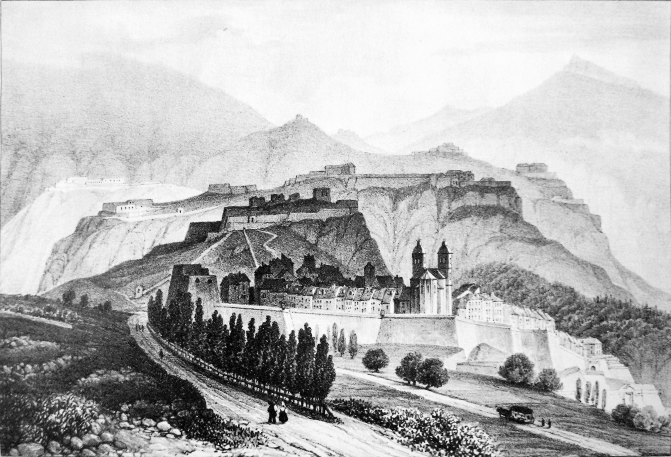 Briançon (Hautes-Alpes) ATTENTION ! Ce facsimilé a été réalisé en applicant des alterations avec un logiciel graphique à une copie numérique, obtenue à partir d'une prise de photo faite par un non-professionnel. Elle pourrait ne pas être parfaitement réussie.